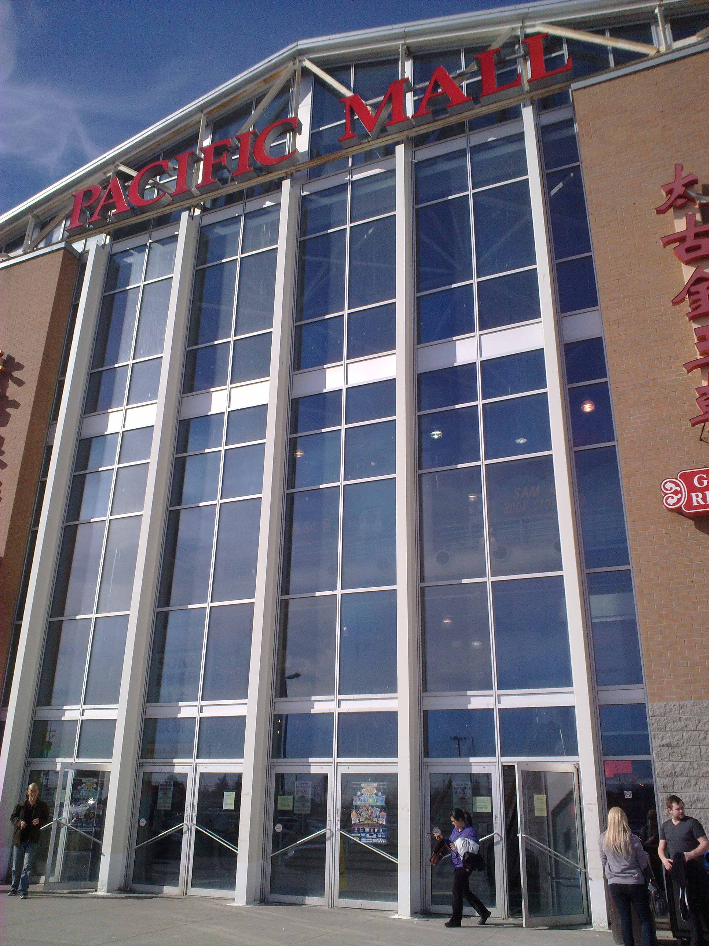 Pacific Mall, Markham, Ontario, Canada